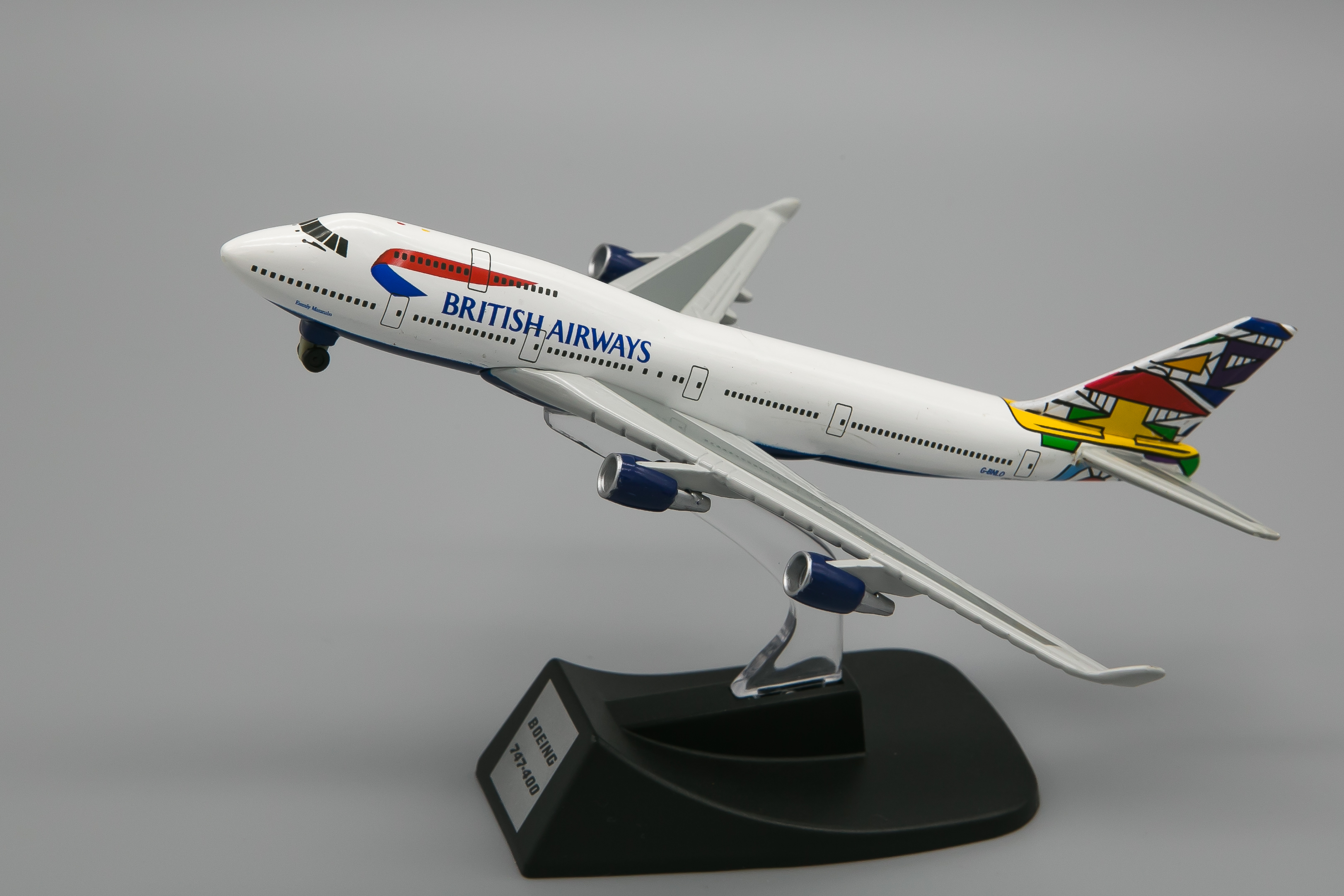 Modèle réduit d'un B747-400 - BRITISH AIRWAYS - G-BNLO